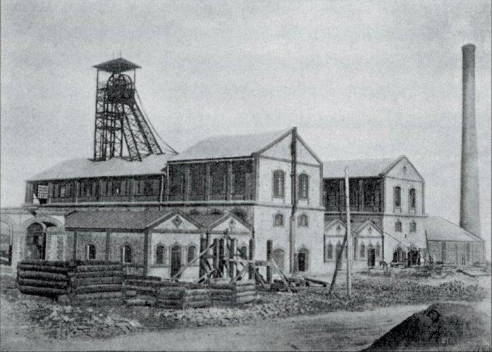 Юзовка. Первая шахта, первая коксовая печь